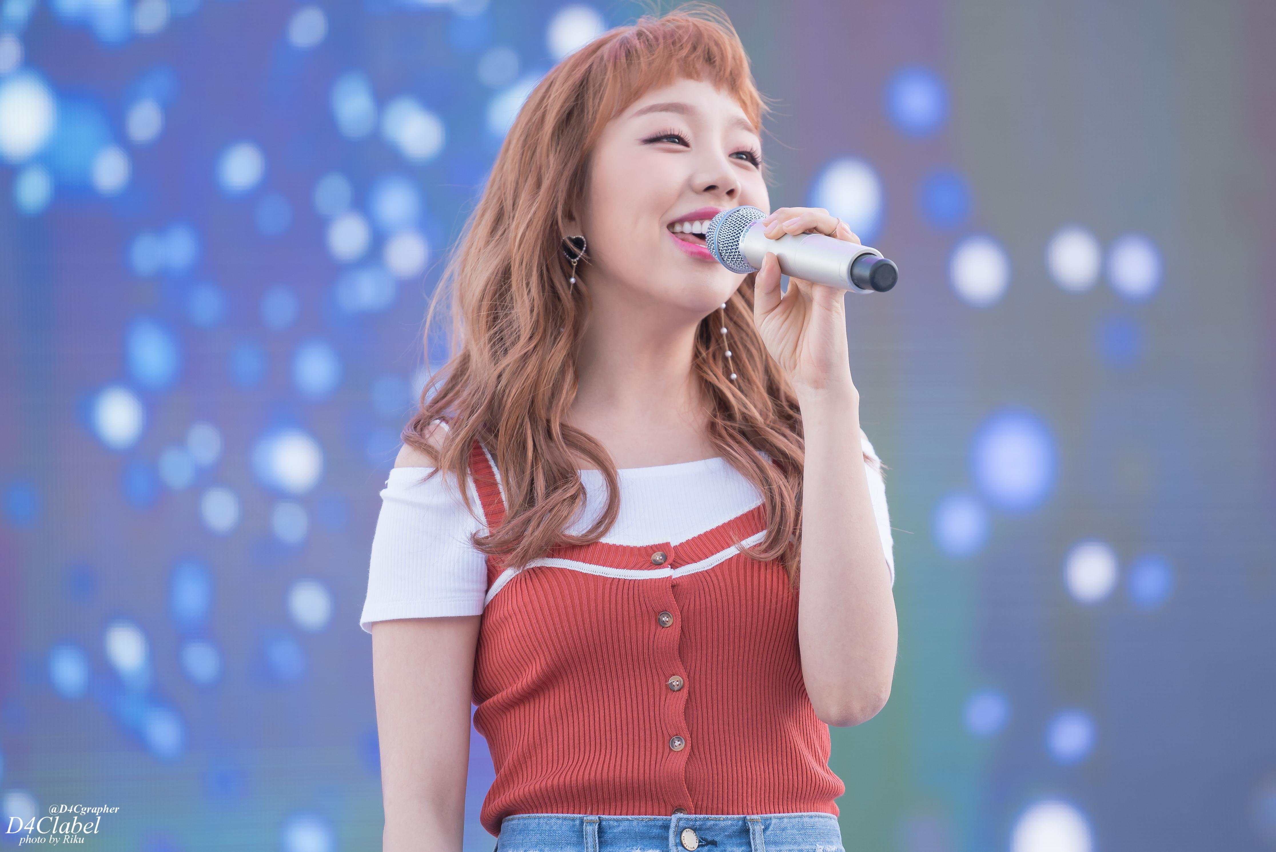 [17.05.25] 백아연